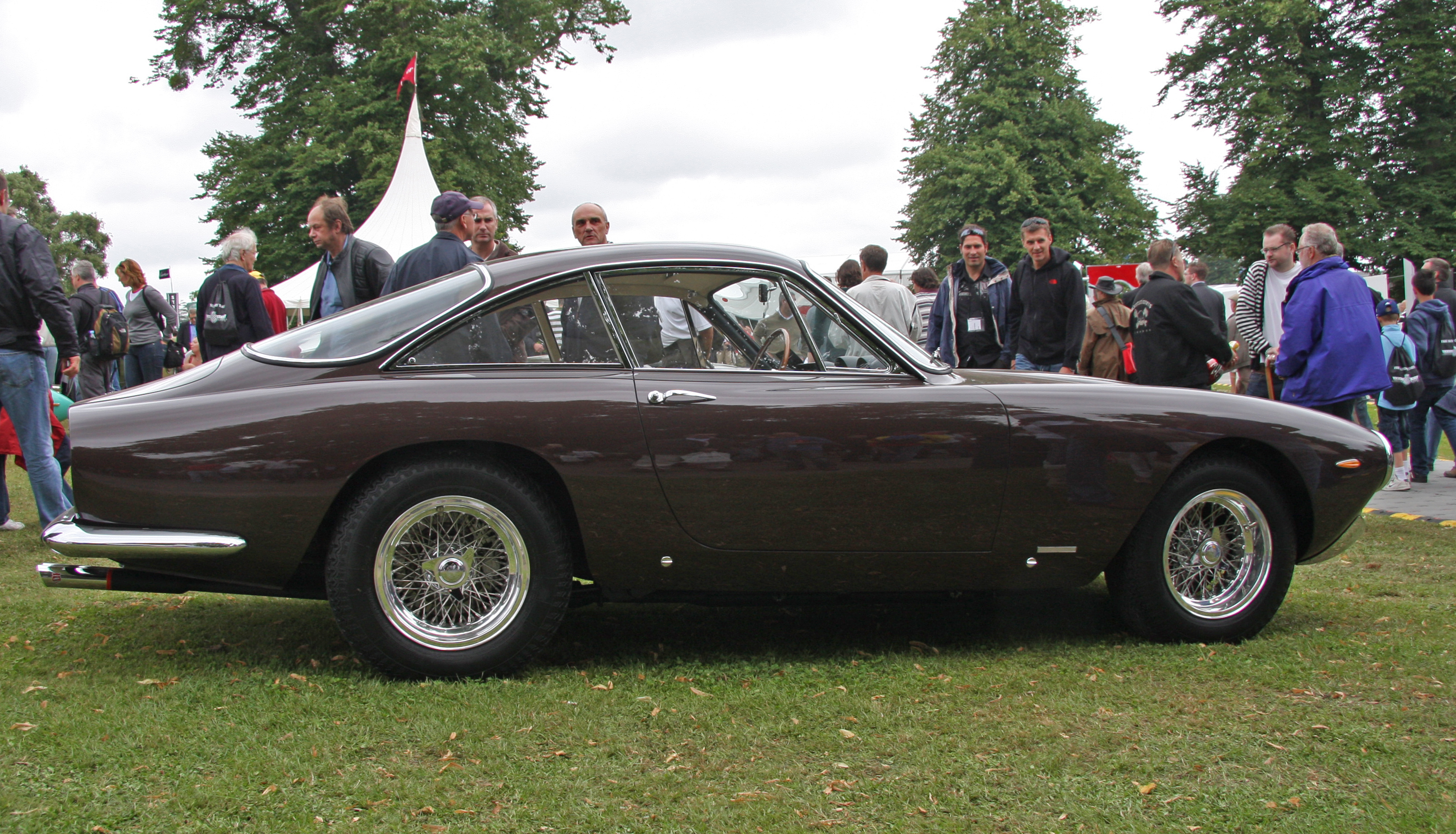 Ferrari 250 GT Lusso